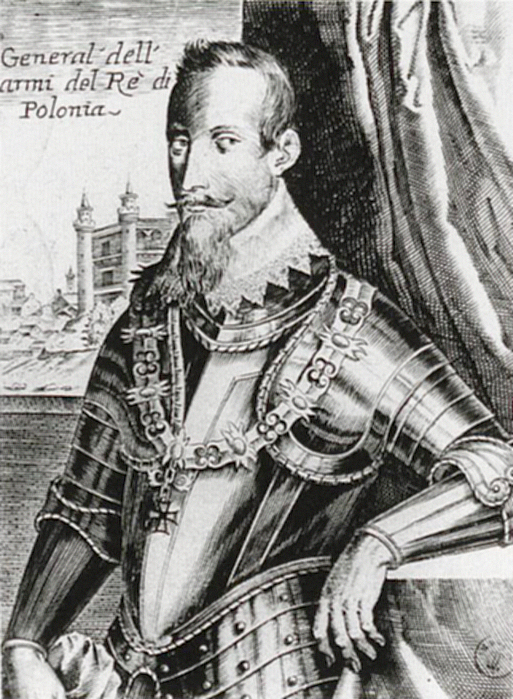 Беларуская (тарашкевіца): Партрэт Паўла Стэфана Сапегі (Pavał Stefan Sapieha) гербу «Ліс» (1565—1635), дзяржаўнага і вайсковага дзеяча Вялікага Княства Літоўскага, канюшага вялікага і падканцлера літоўскага.